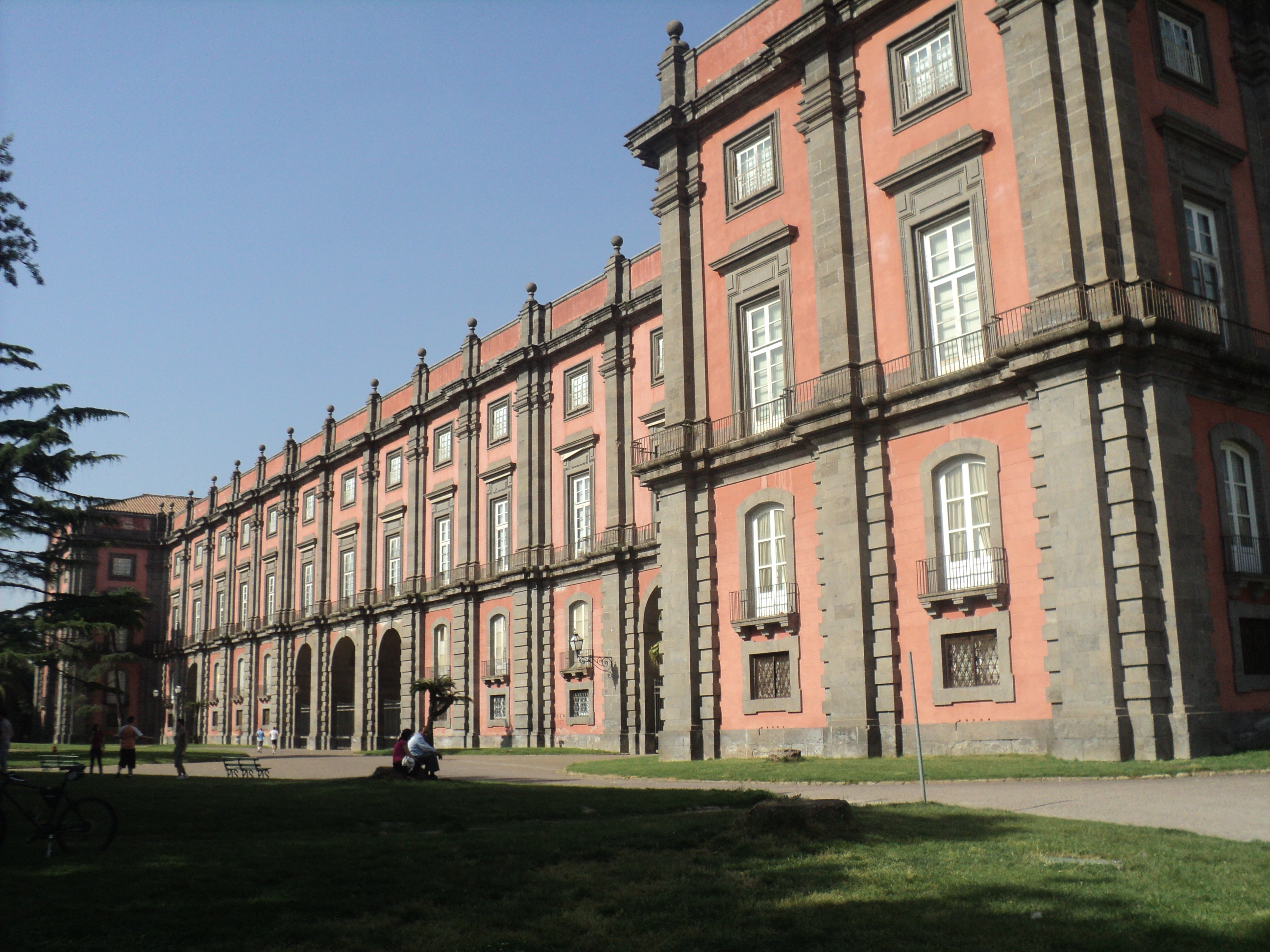 Reggia di Capodimonte (Napoli) - lato posteriore